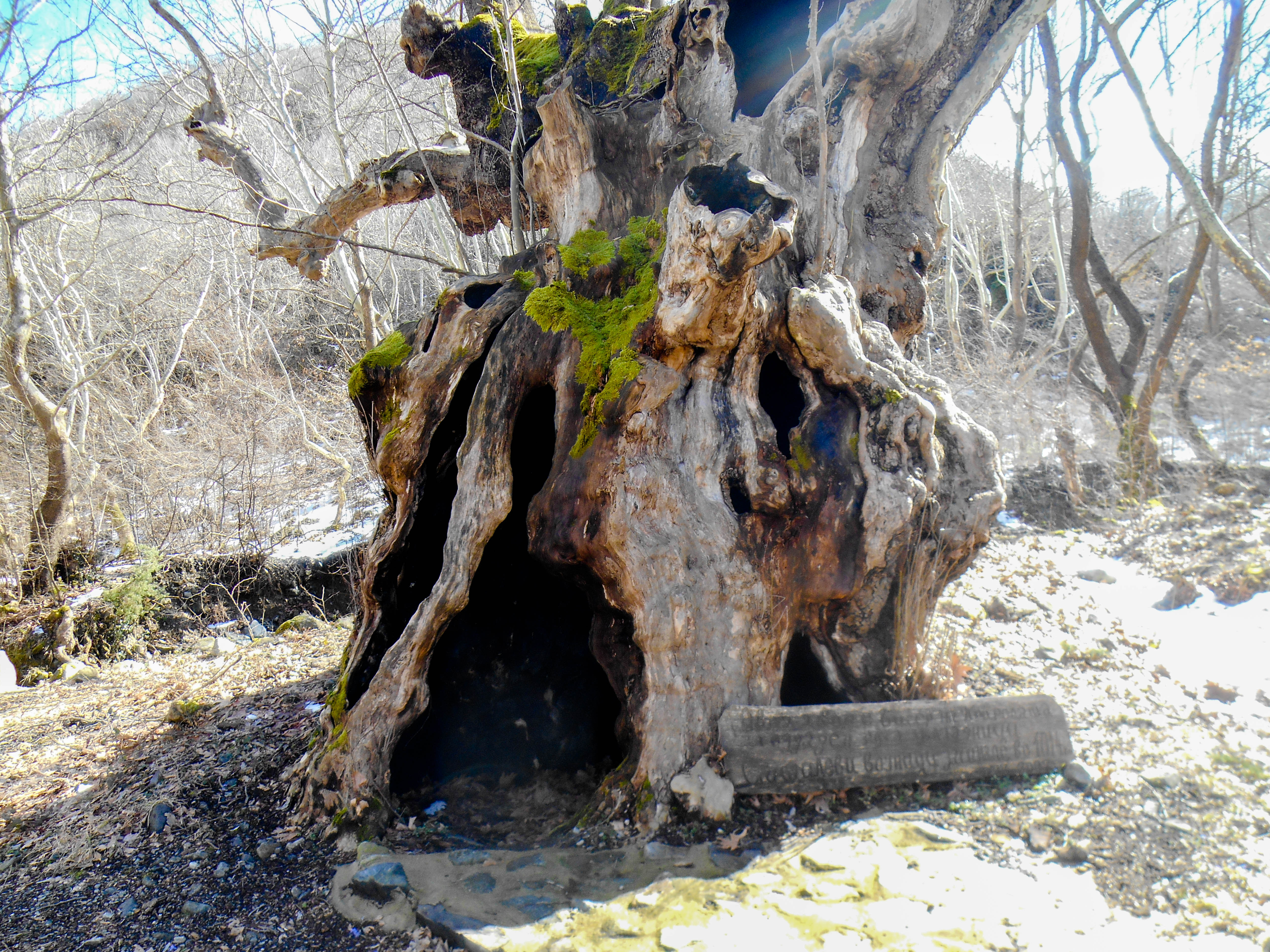 Јавор на Пирго